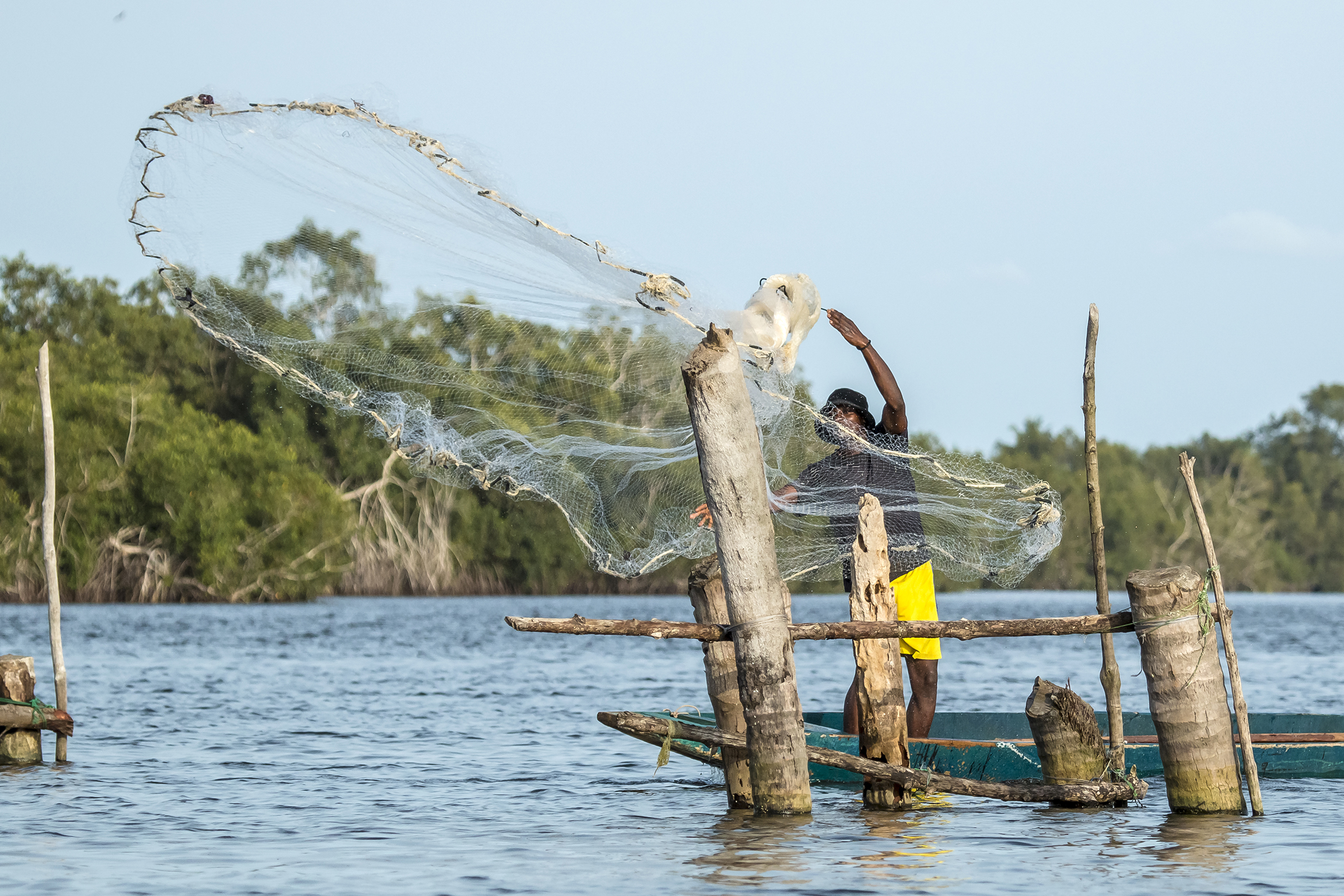 La pêche à l'épervier est une technique très répandue et toujours spectaculaire.